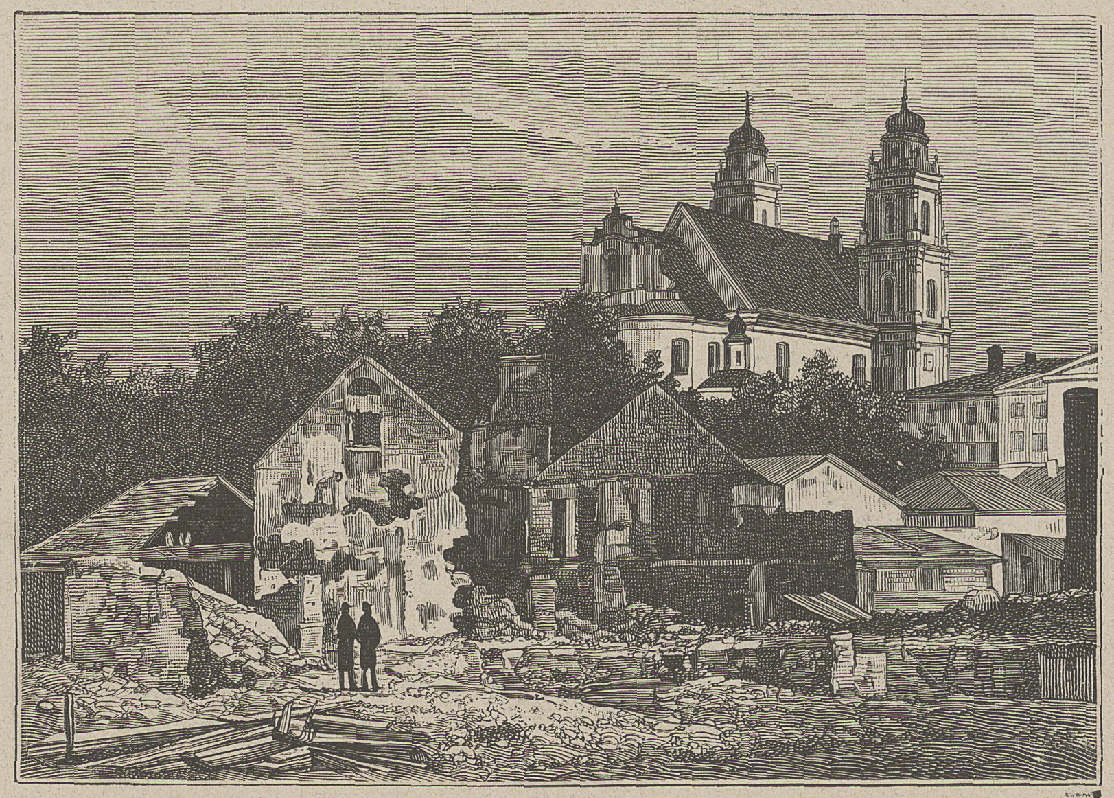 Беларуская (тарашкевіца): Менск (Miensk), рог вуліц Зборавай (vulica Zboravaja) і Фэліцыянаўскай (vulica Felicyjanaŭskaja) па пажары